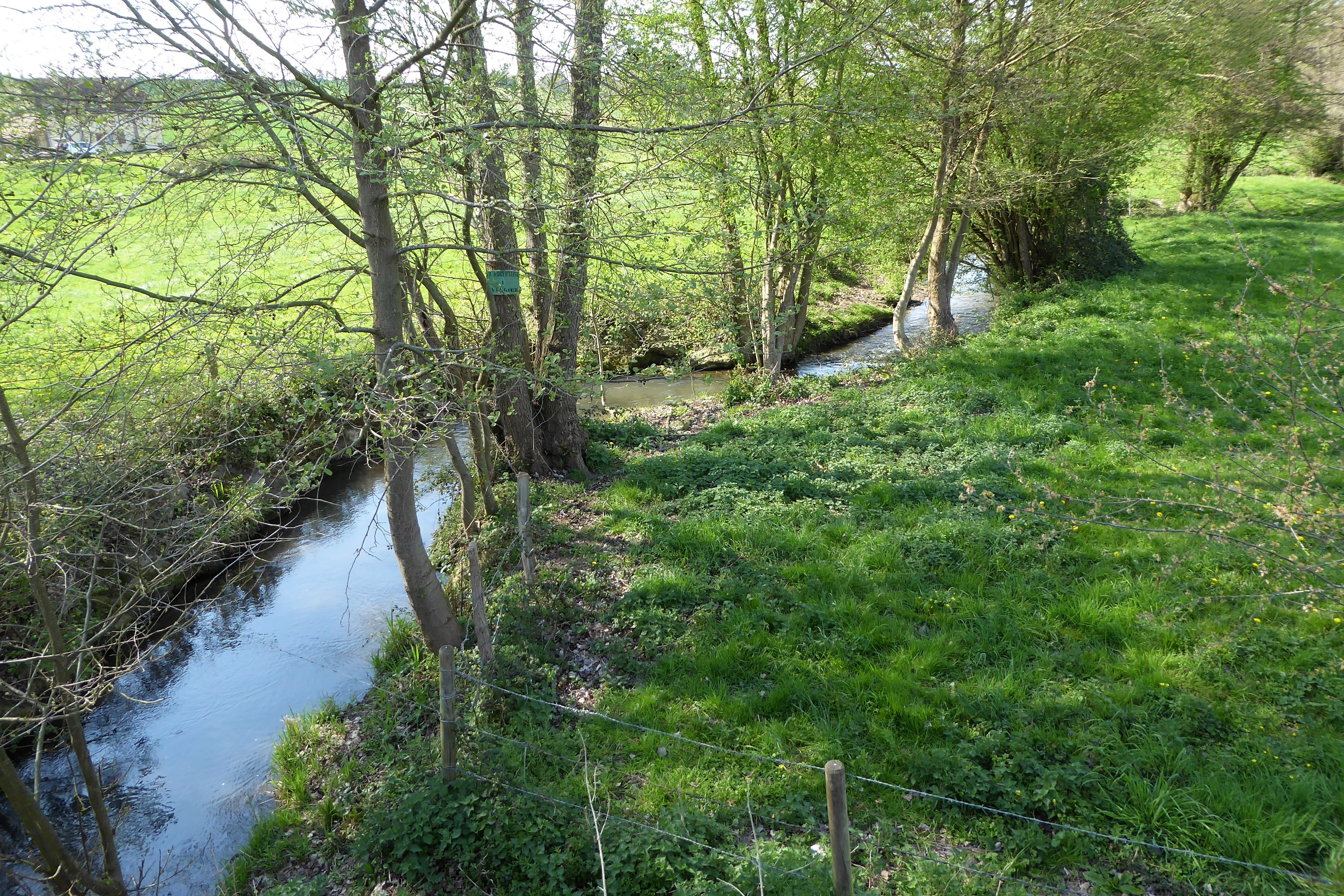 la Berthe, cours d'eau de 1ère catégorie géré par La Nogentaise, D110.7, Trizay, Eure-et-Loir, France.